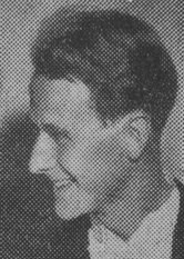 Ebbe Lidemark